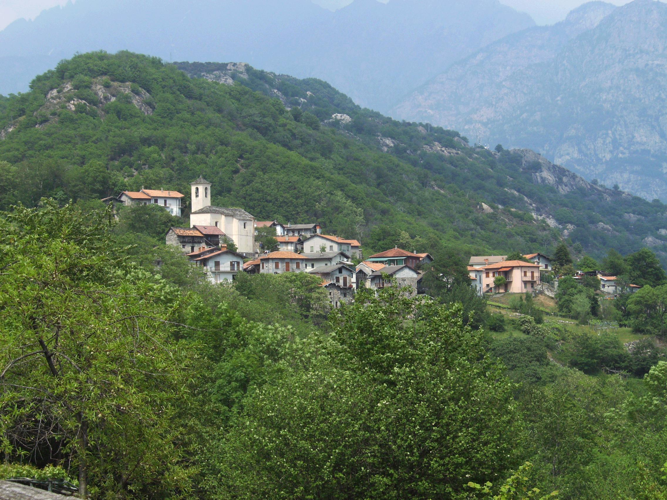 Albonico, frazione di Sorico